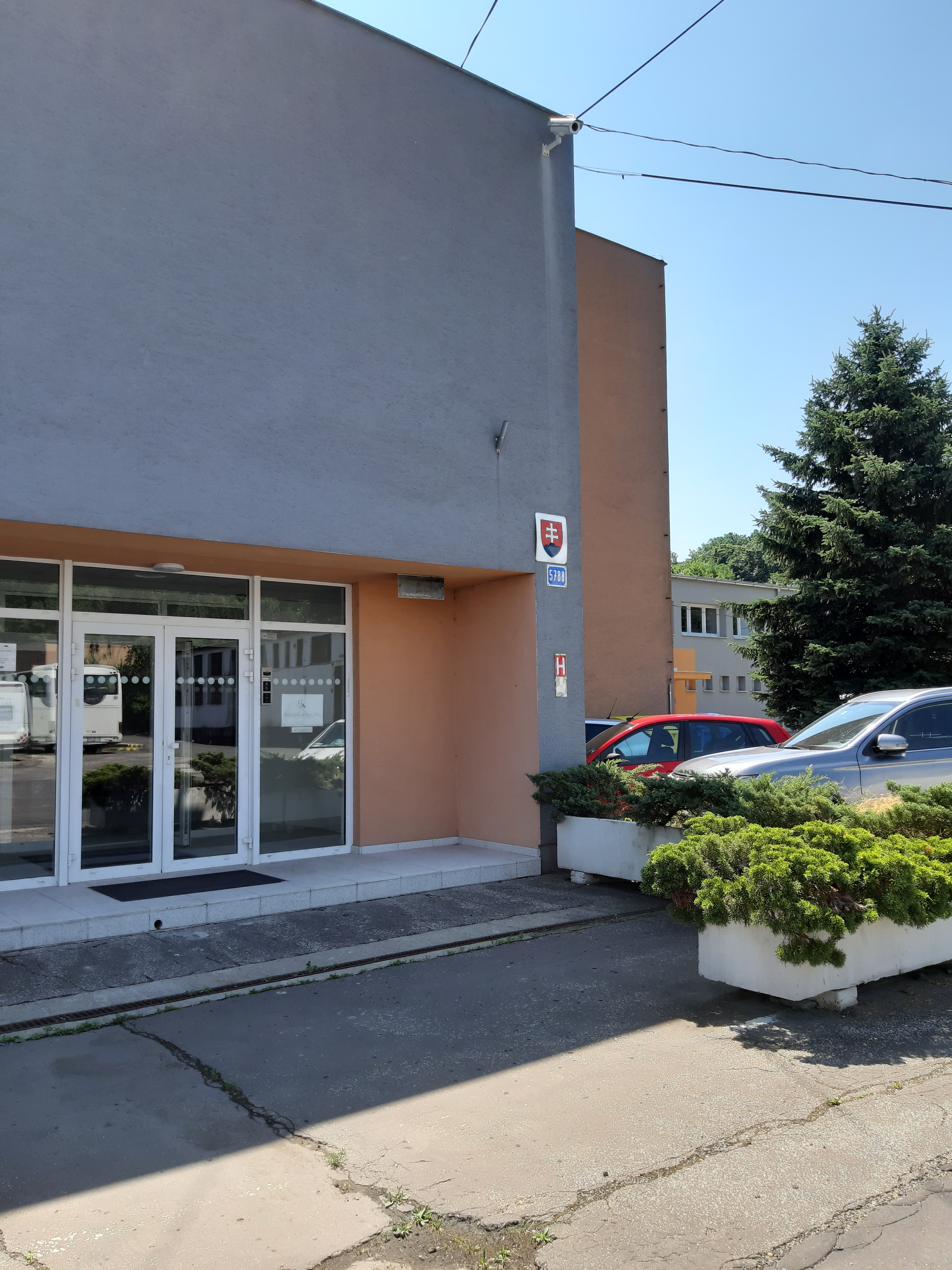 Sídelná budova Ústredného archívu SAV v areáli SAV na Patrónke v Bratislave